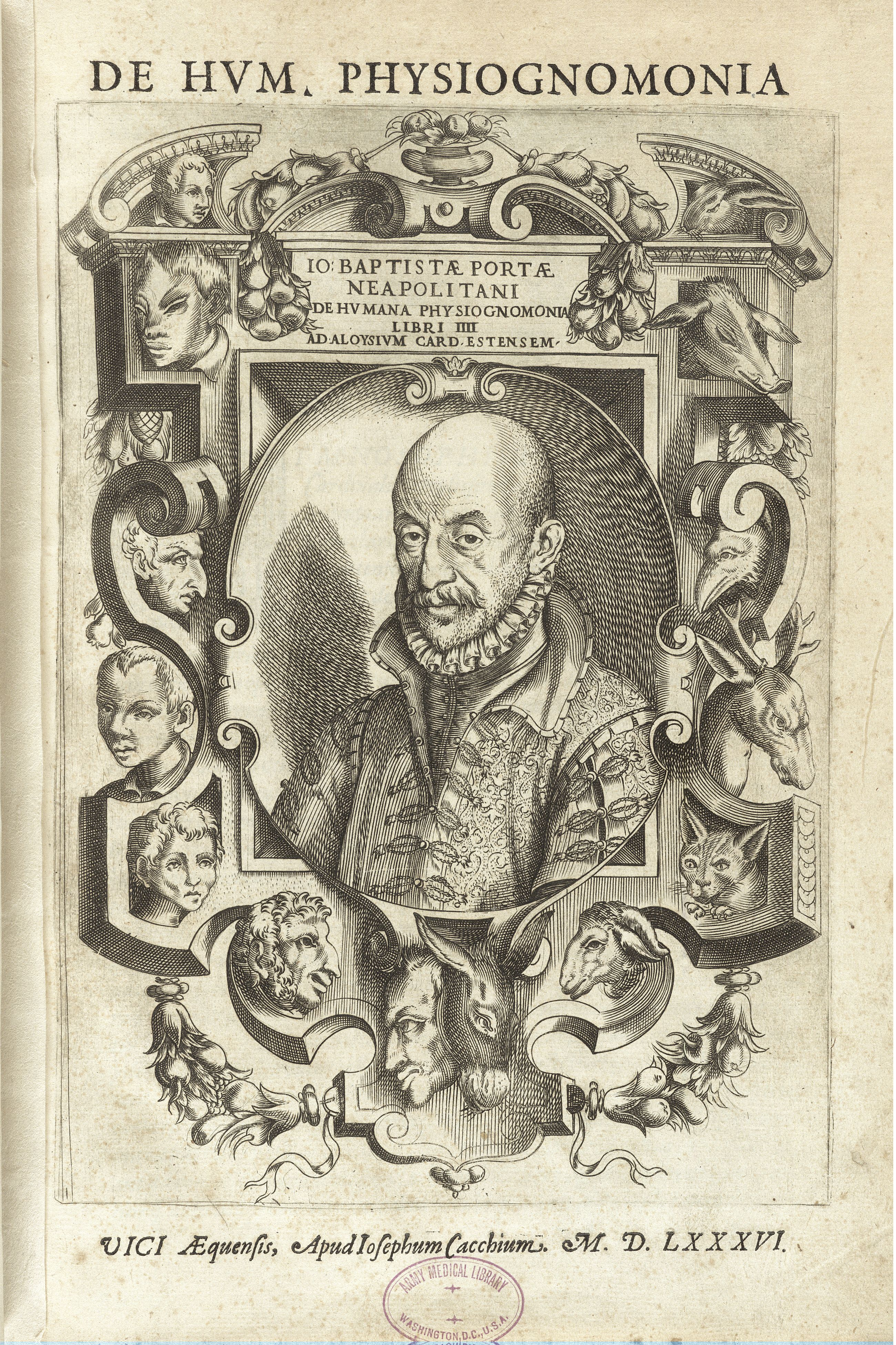 Обложка “De humana physiognomica” (“О человеческой физиогномики”) работы Баптиста Порта